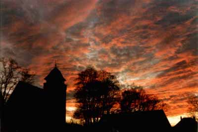 Quelle: Selbst fotografiert Fotograf/Zeichner: Torsten Schlemmer Datum: 1990 - 2006